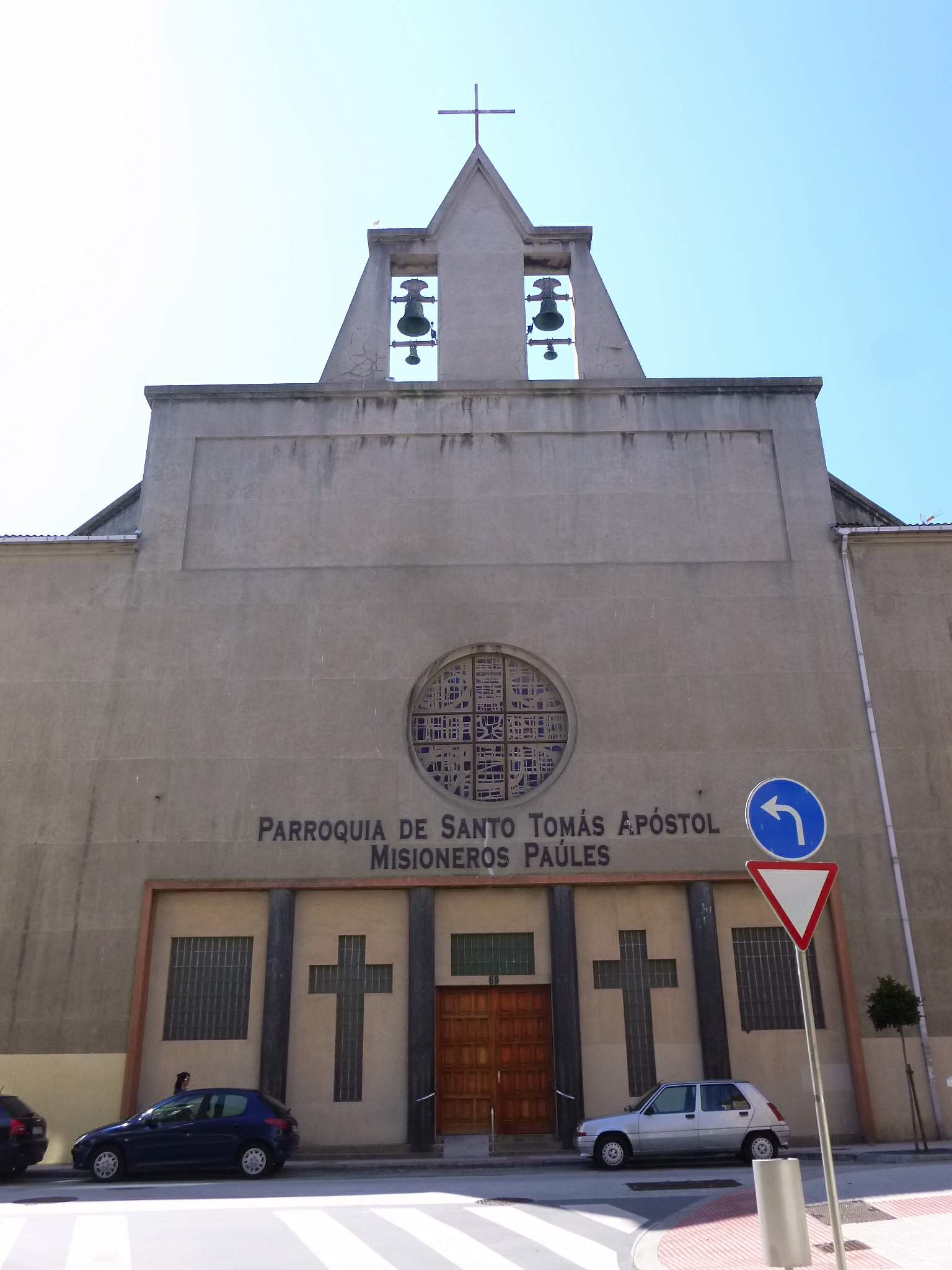 A Coruña - Iglesia de Santo Tomás Apóstol (Misioneros Paúles)